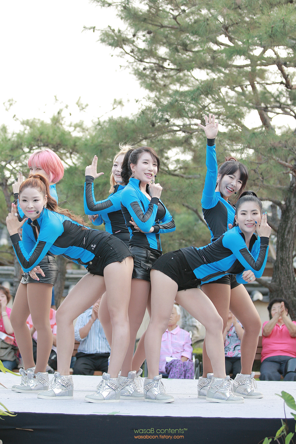 걸그룹 비비드